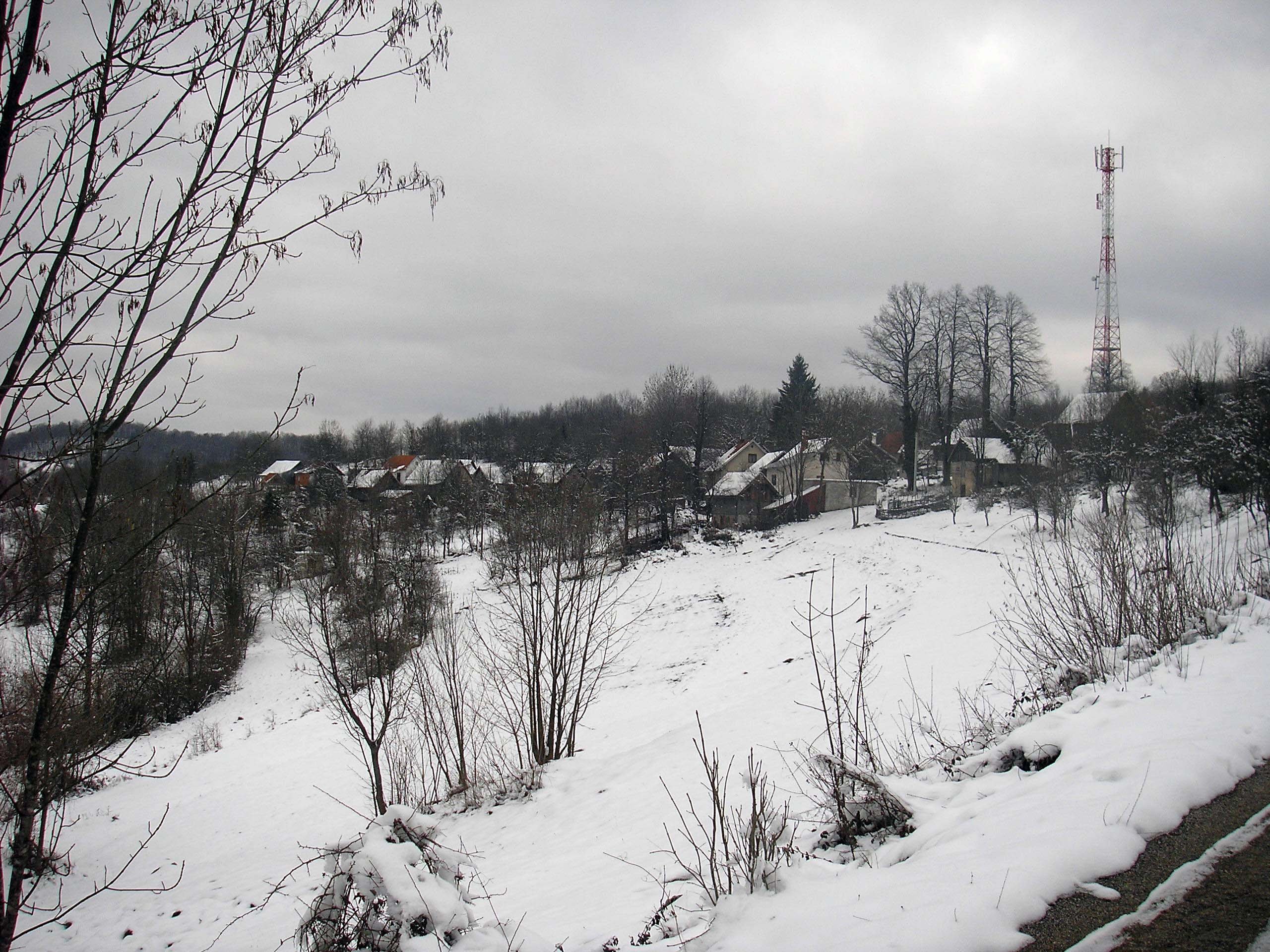 Radigojna